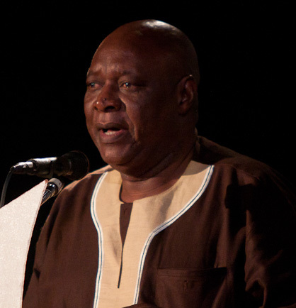 Mathias Chikawe